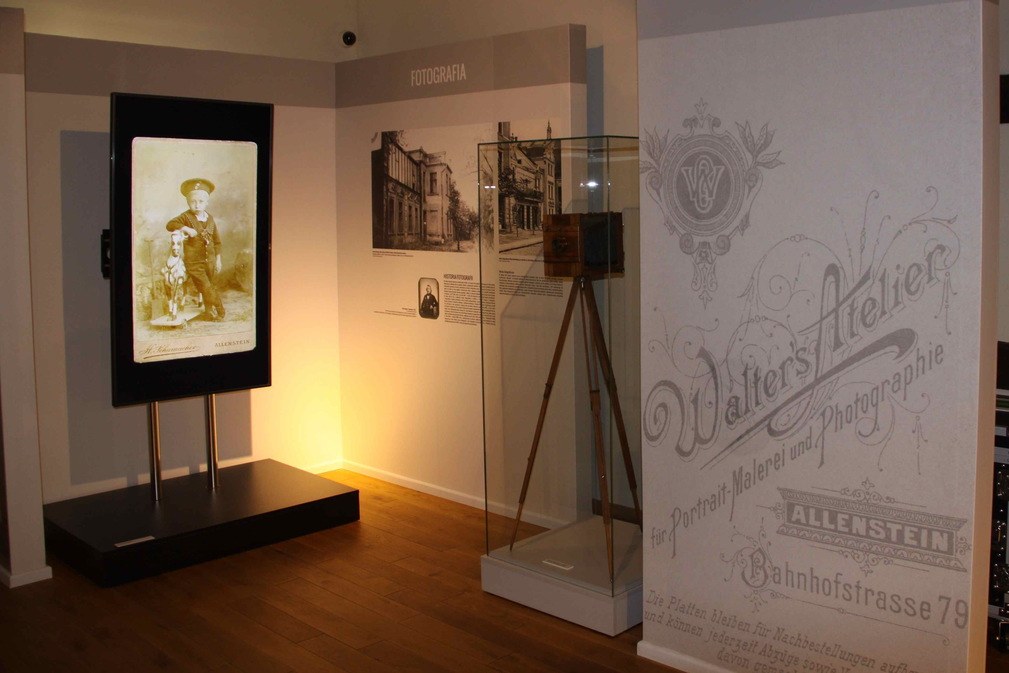 Technikmuseum Allenstein